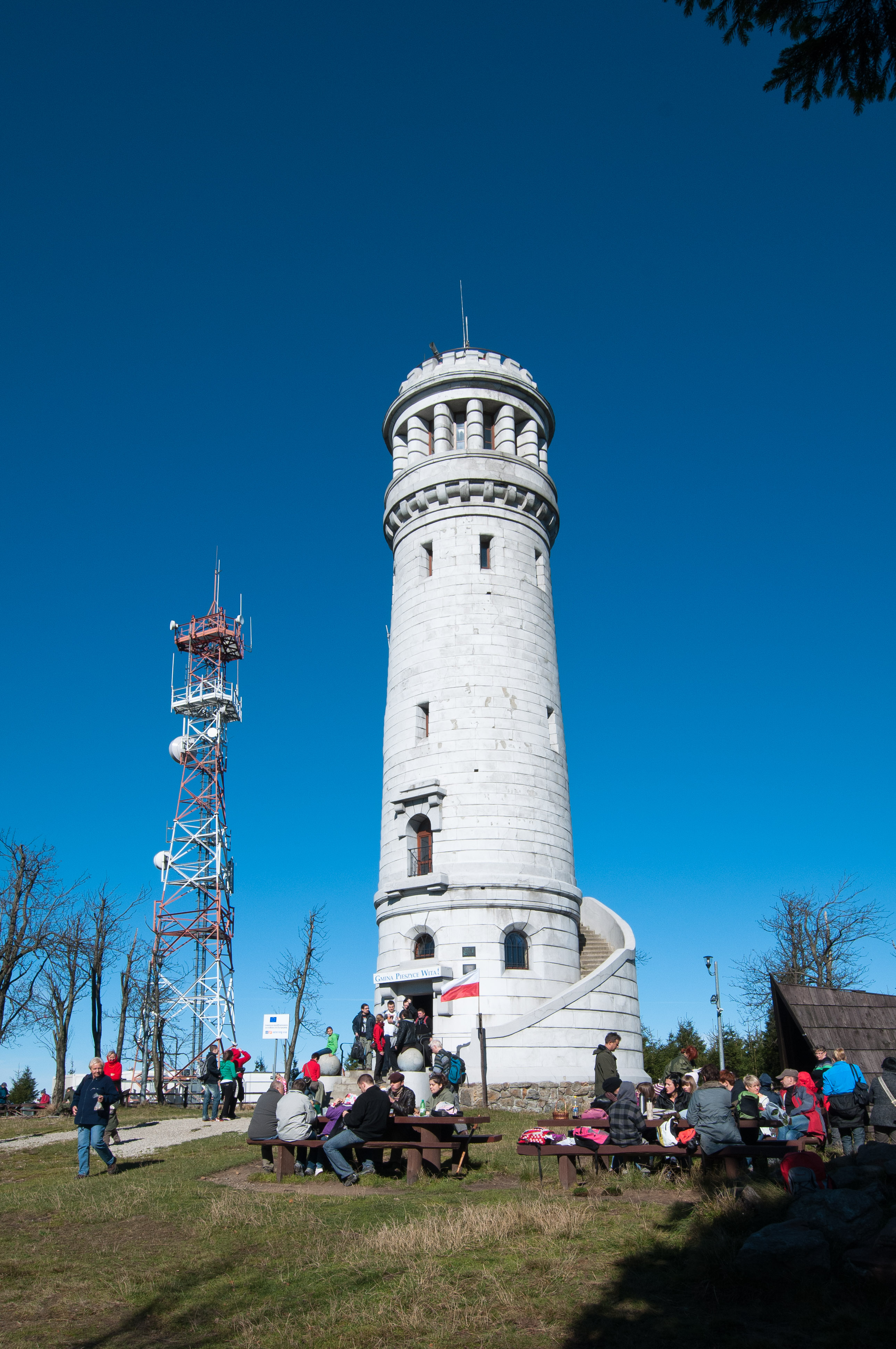 Wielka Sowa, wieża widokowa.